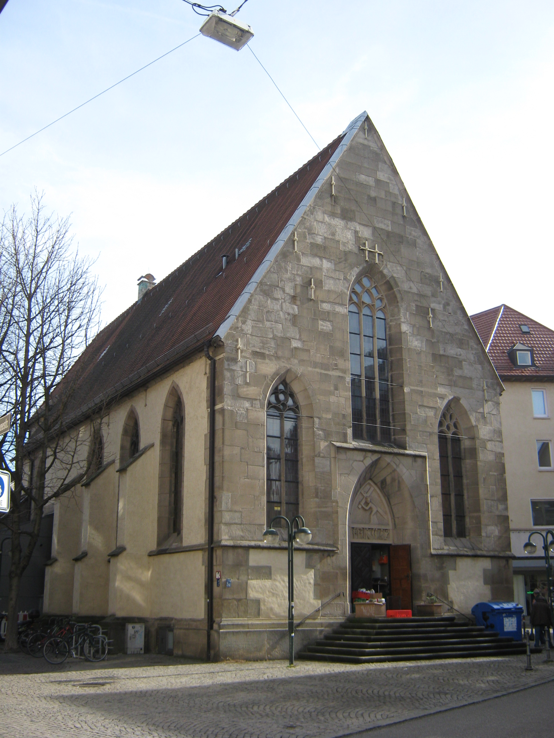 Nikolaikirche Reutlingen Westansicht mit Federseestrasse